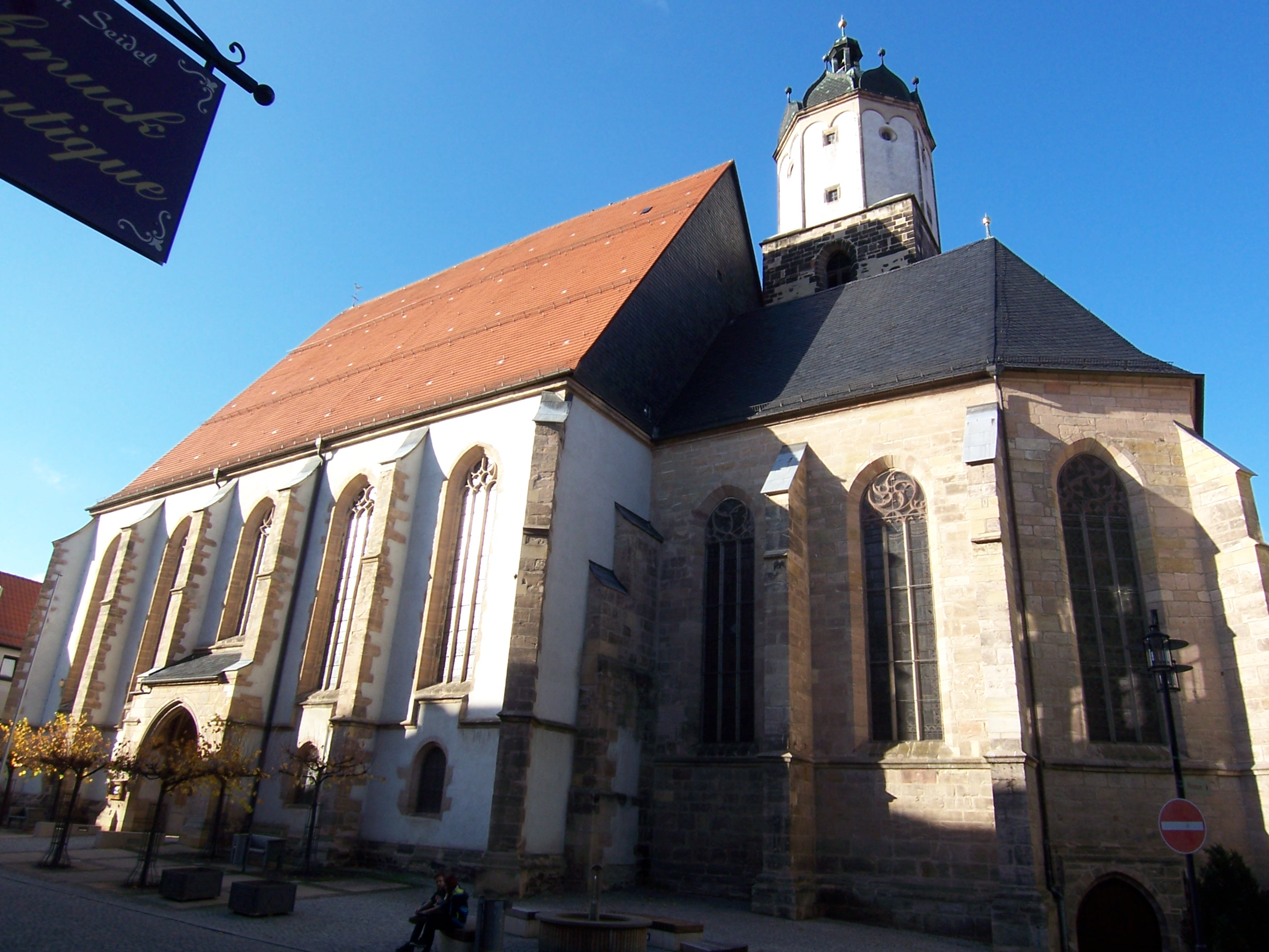 Stadtkirche St. Johannis NeustadtOrla